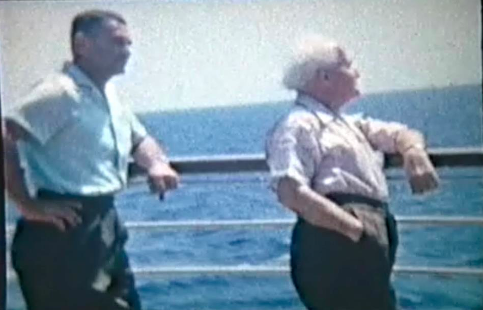 חיים בן-דוד (חב"ד) ודוד בן-גוריון